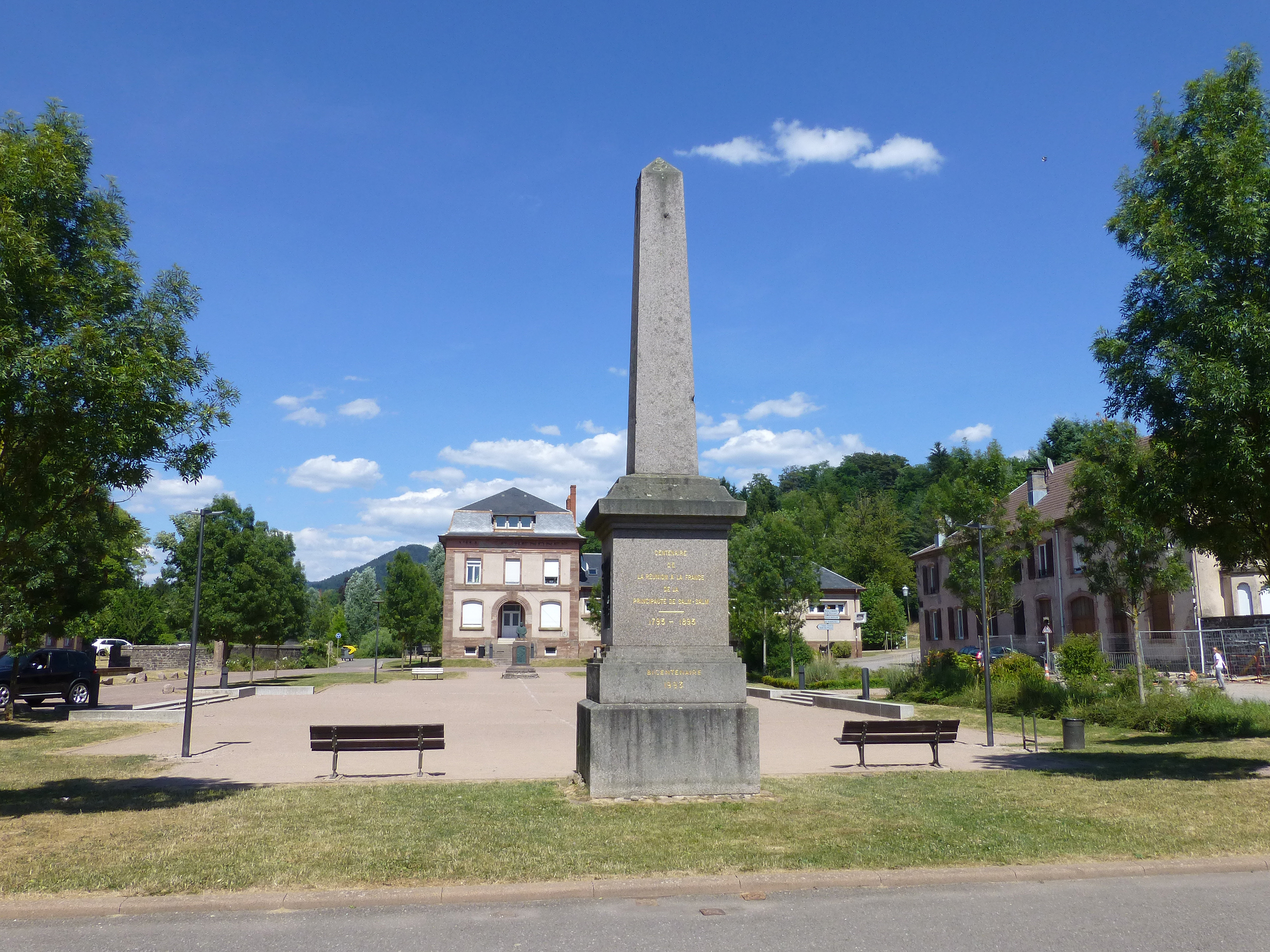 Senones (Vosges) : monument de 1893 commémorant le centenaire du rattachement de la principauté de Salm à la France